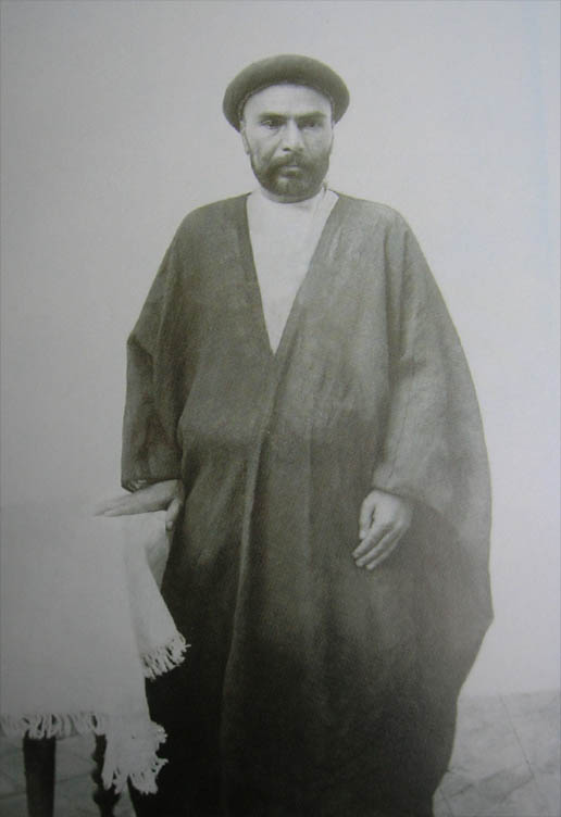 عکسی از مرحوم حاج قدسی یزدی